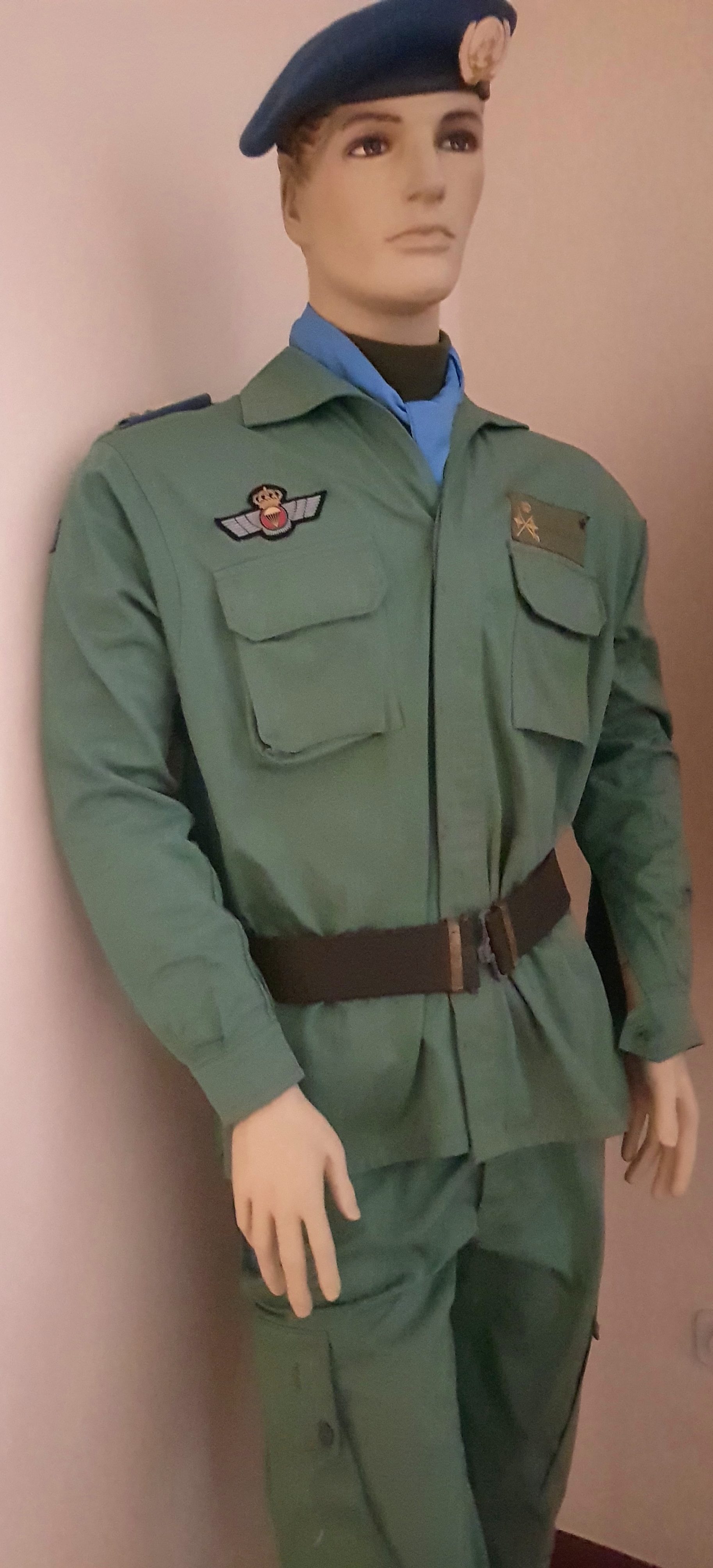 Uniform des ersten spanischen Soldaten, der an der UN-Beobachtermission ONUCA, 1989/90 in Nikaragua, teilnahm.